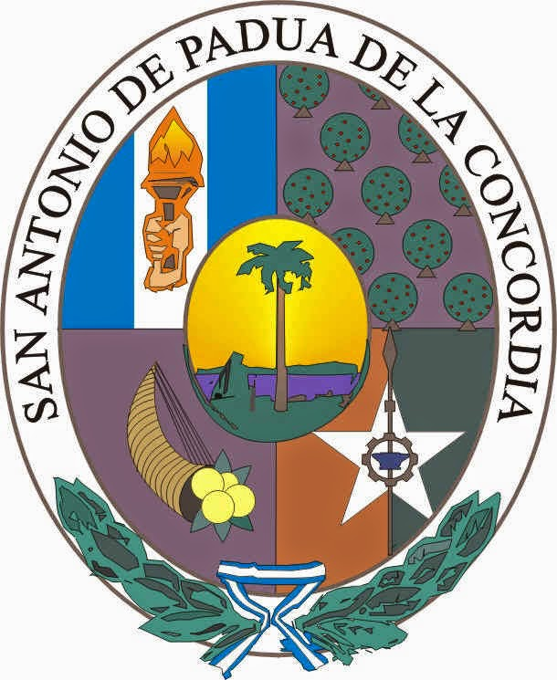 Escudo de la ciudad de Concordia, provincia de Entre Ríos